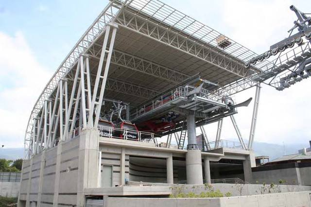 Metrocable de Caracas estacion san agustin 2009